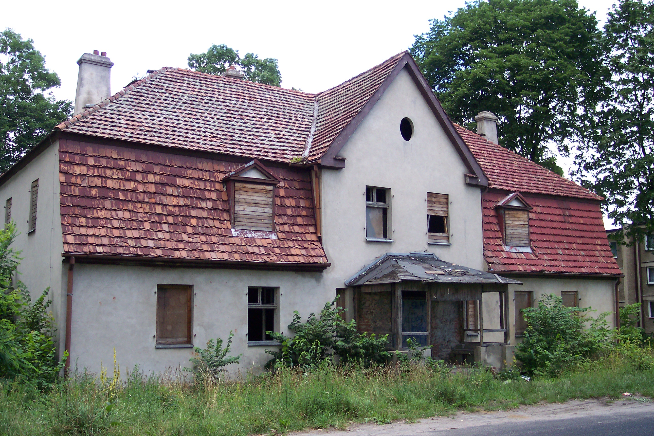 Dworek myśliwski w Panoszowie